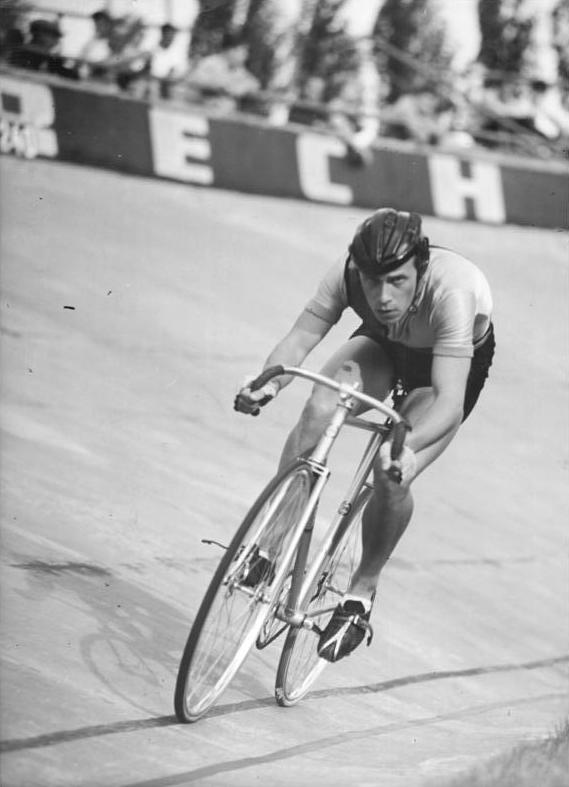 Peter Gröning Zentralbild Wendorf 26.6.1960 Saison-Auftakt in Weißensee Auf der Radrennbahn in Berlin-Weißensee stand am 25.6.1960 im Mittelpunkt das Tandemfahren, sowie ein 50 km-Dauerrennen hinter Motoren. UBz:Mit 1:12,5 Min. erziehlte Peter Gröning die beste Zeit im 1000 m-Einzel-Zeitfahren.